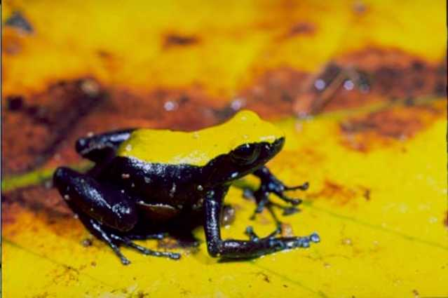 Mantella laevigata